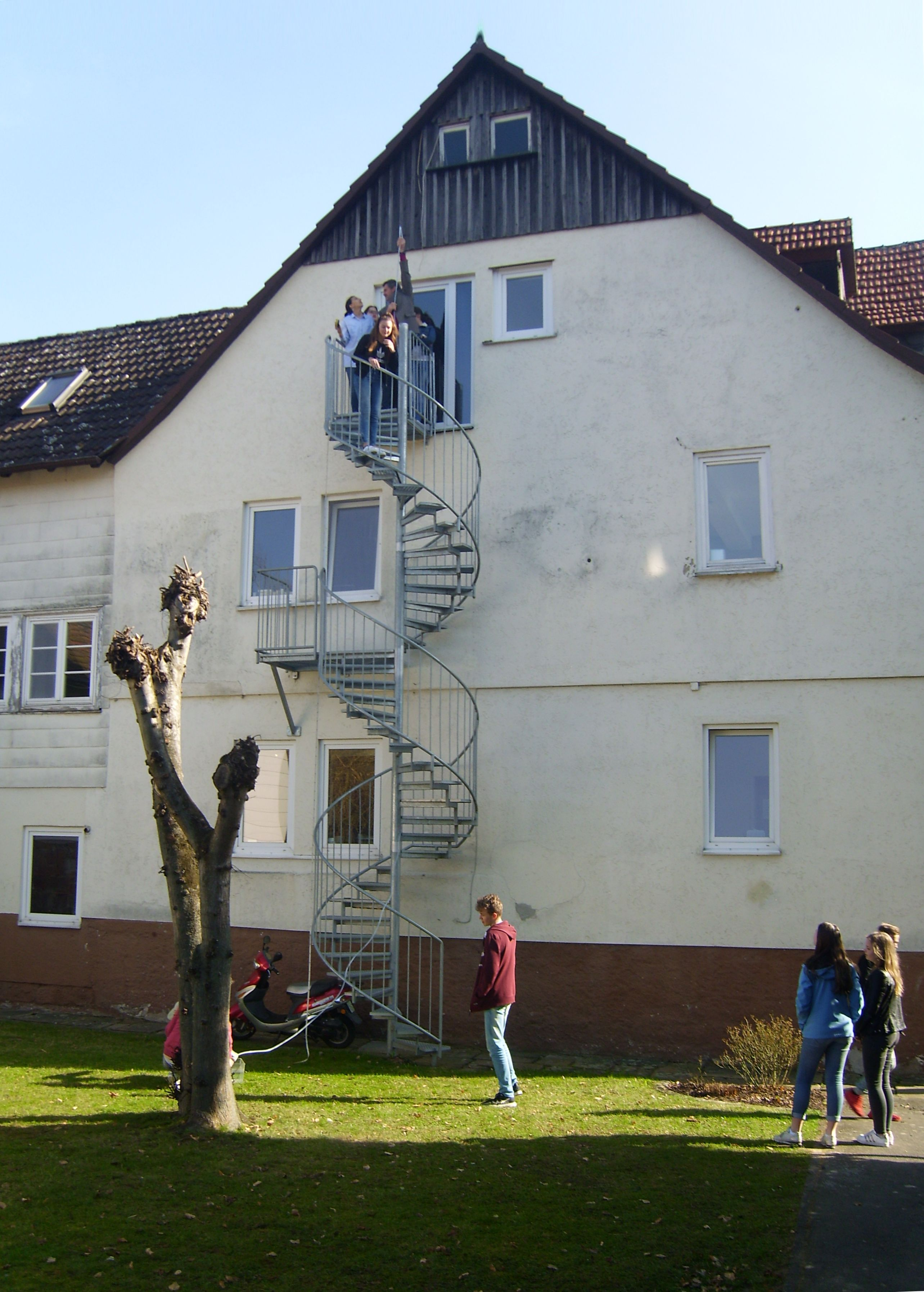 Aufführung des Lehrstücks (siehe Lehrkunst) Pascals Barometer am Landschulheim Steinmühle in Marburg; Dr. Andreas Heiske mit Schülern der 8. Klasse.